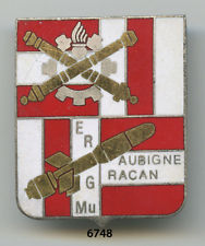 Insigne de l'Établissement de Réserve Générale de Munitions d'Aubigné